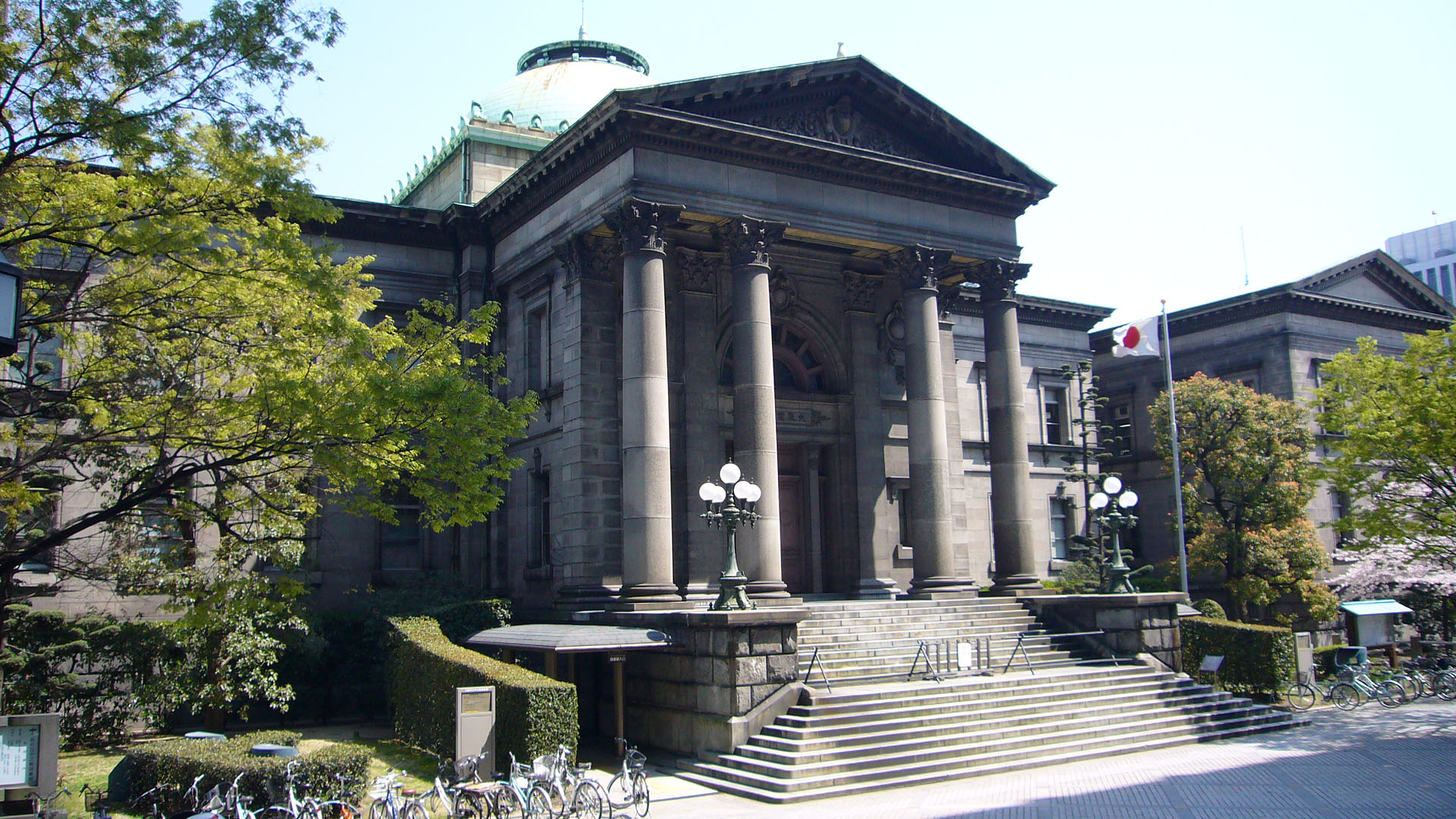 Osaka Prefectural Nakanoshima Library in Osaka, Japan